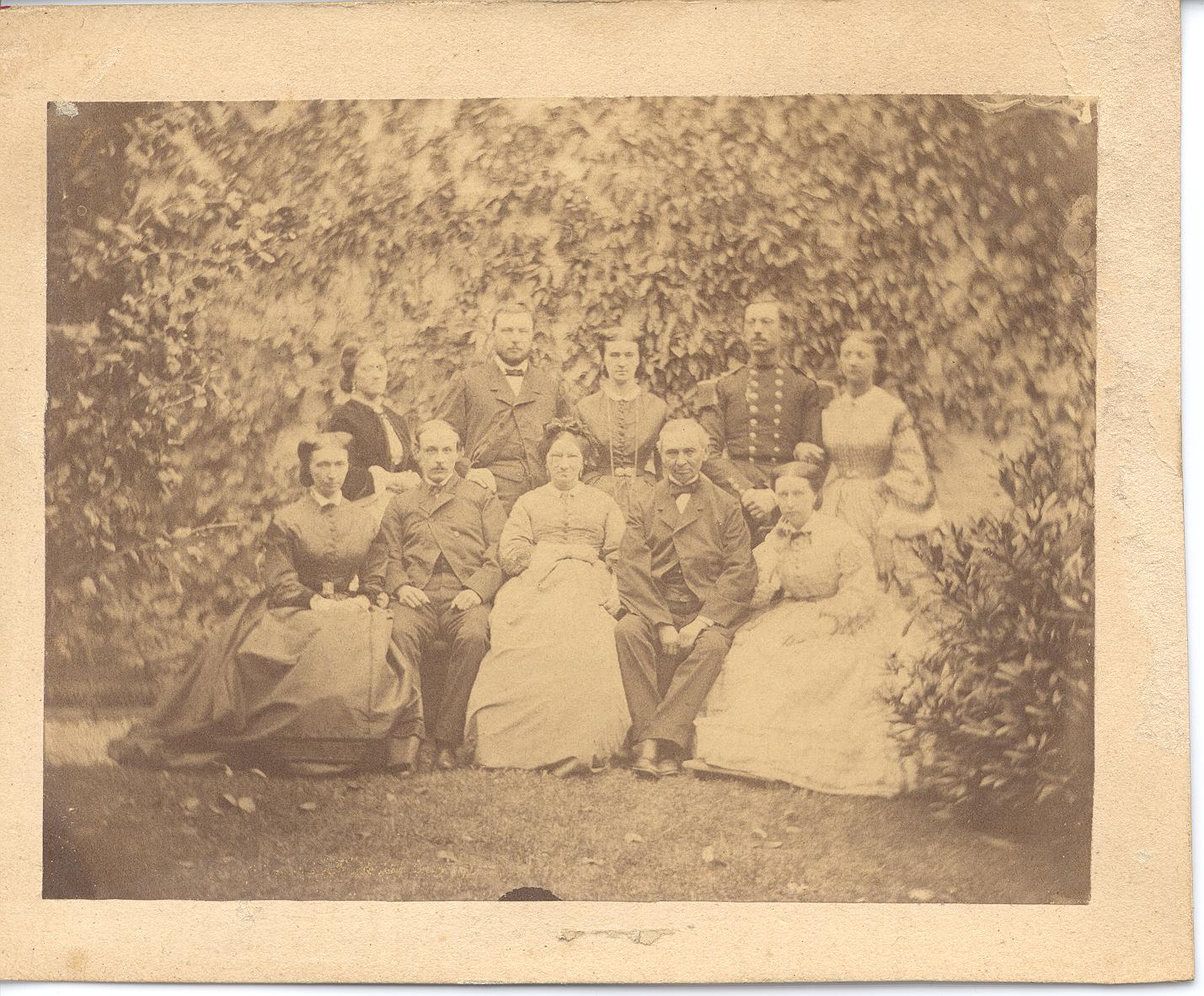 L'armateur bruxellois Lambert Straatman, avec son épouse et enfants et beaux-enfants, vers 1863. Lambert STRAATMAN, commissionnaire-expéditeur, affréteur, agent d’assurances maritimes et en douane, armateur , à Bruxelles (Quai au Bois à Brûler, 36) et à Anvers (Quai St Pierre, 11), né à Bergen op Zoom le 14 octobre 1802, fils de Arnold et de Anne Marie Vetten, décédé à Ixelles le 18 avril 1888, épousa à Bruxelles le 11 mars 1826, Marie-Sophie FAUTIER, née à le 7 juin 1802, décédée à Bruxelles le 8 novembre 1878, fille de Pierre Joseph et de Marie Adrienne van der Burch. On y voit, assis de gauche à droite: Sophie Straatman (1833-1889), son mari Charles Mogin (1834-1877), Sophie Fautier (1802-1878), son mari Lambert Straatman (1802-1888), Marie Straatman (née en 1830) (épouse de l'ingénieur Jean Battaille, en Russie); debout de gauche à droite: Hermine Straatman (1838-1917) future épouse de Léon van Dievoet (1838-1908), Arnould Straatman (1835-1877) futur mari de Joséphine Bridoux (1842-1873, Anna Straatman (1840) future épouse du général Beaudrihaye, Charles Rouen, futur général (né en 1838) et son épouse José Straatman (née en 1842)